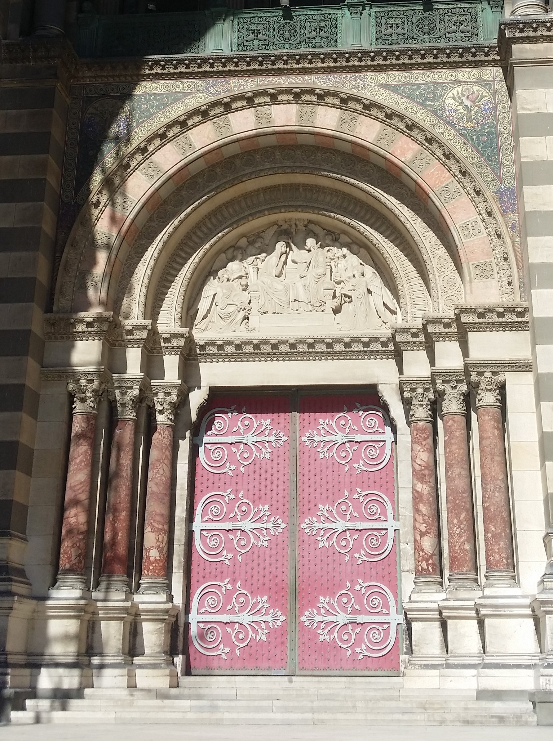 Porte d'entrée principale de la cathédrale Sainte-Marie-Majeure de Marseille.